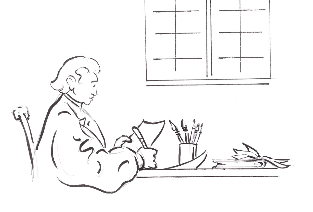 Anne Grahame Johnstone (1928-1998), illustratrice britannique de livres pour enfants. Elle et sa soeur jumelle Janet (1928-1979) ont illustré des dizaines d'ouvrages, avec un sens du détail et de la précision qui contribuent à leur célébrité. Après la mort accidentelle de Janet, Anne continue de travailler sous son nom propre jusqu'à son propre décès dans sa résidence de Badingham, dans le Suffolk.